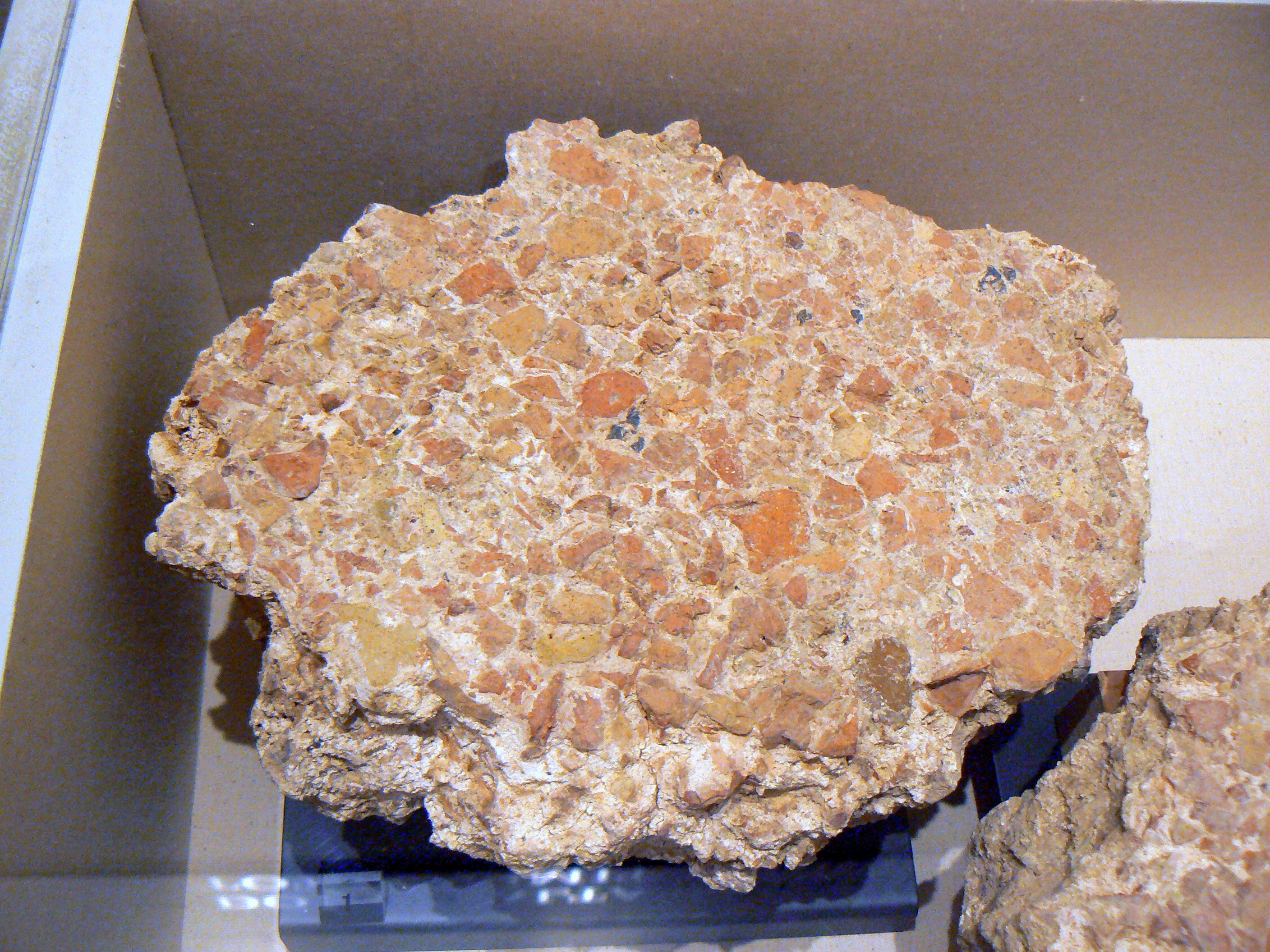 Resti di un pavimento in cocciopesto rinvenuti nella domus del chirurgo e conservati nel museo della città di Rimini. This is a photo of a monument which is part of cultural heritage of Italy.